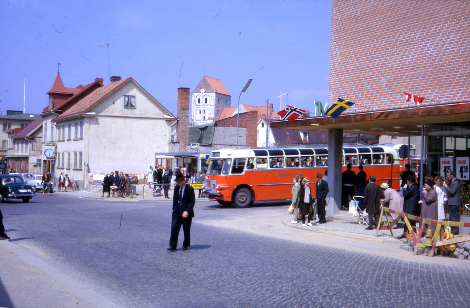 Fotografi från 1963 över Kungsgatan i korsningen mellan Kungsgatan och Nygatan med kvarteren Viktor och Ängeln till höger i bild samt Heliga Kors kyrka i fonden.